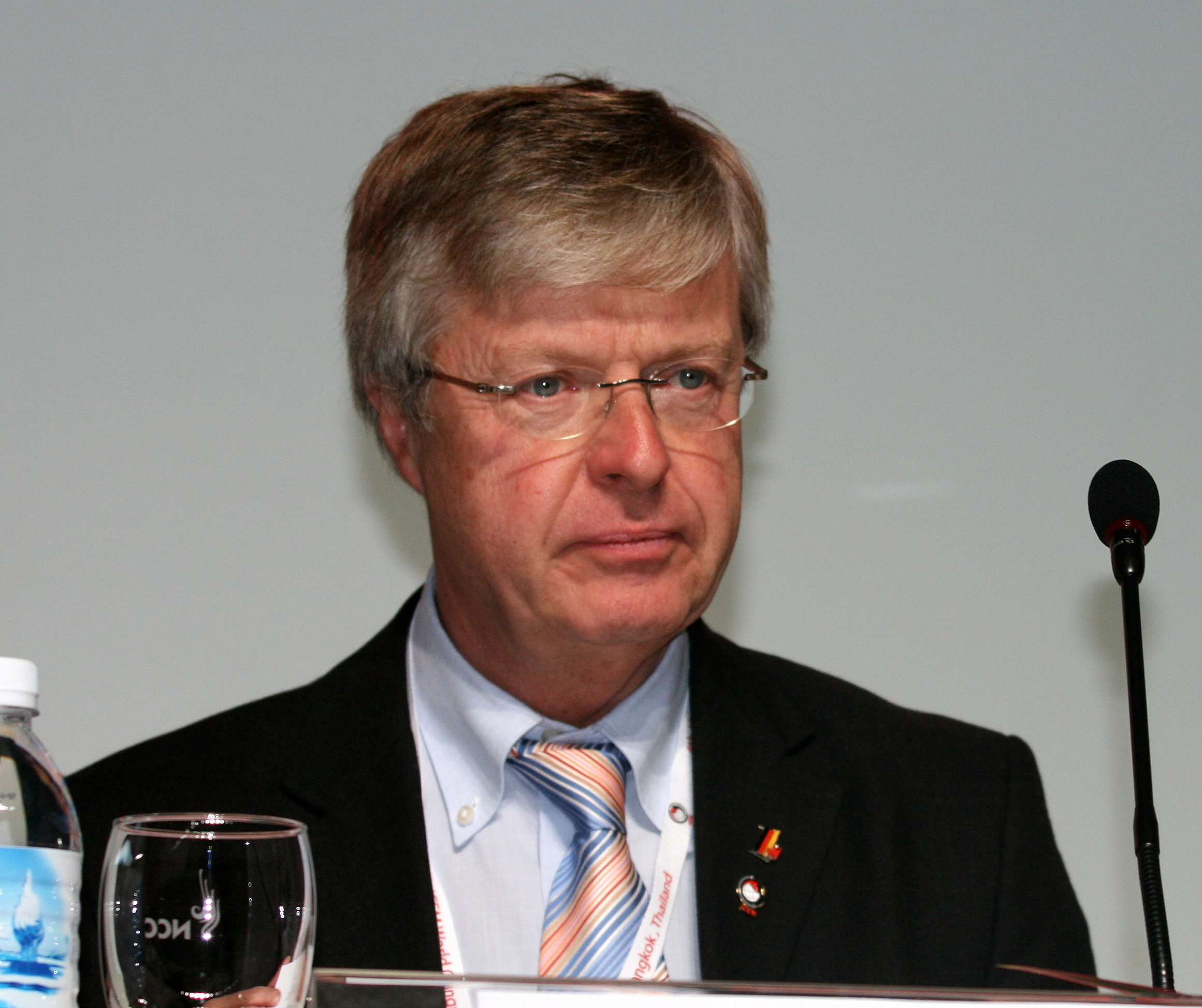 Hubertus Schmoldt på ICEM kongress i Bangkok 2007